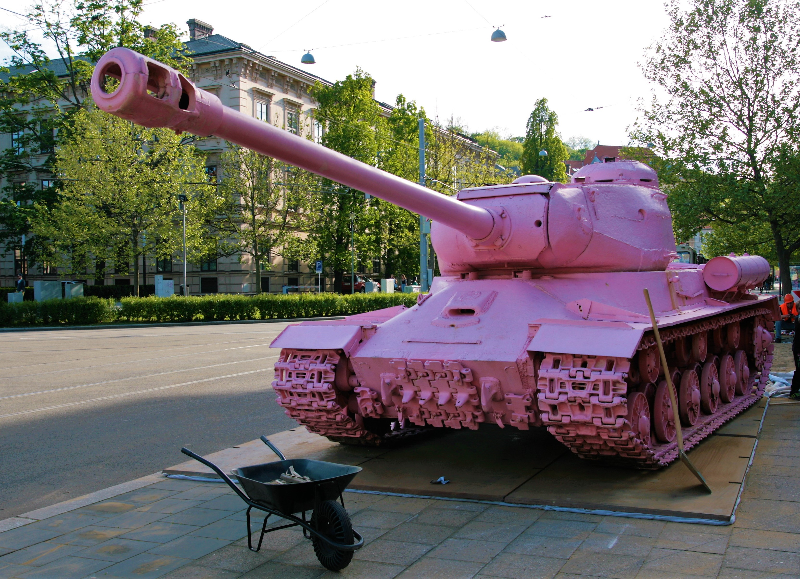 Růžový tank výtvarníka Davida Černého v den instalace 11. 5. 2017 na Komenského náměstí před Červeným kostelem, v rámci výstavy Moravské galerie Kmeny 90 ([1], [2])